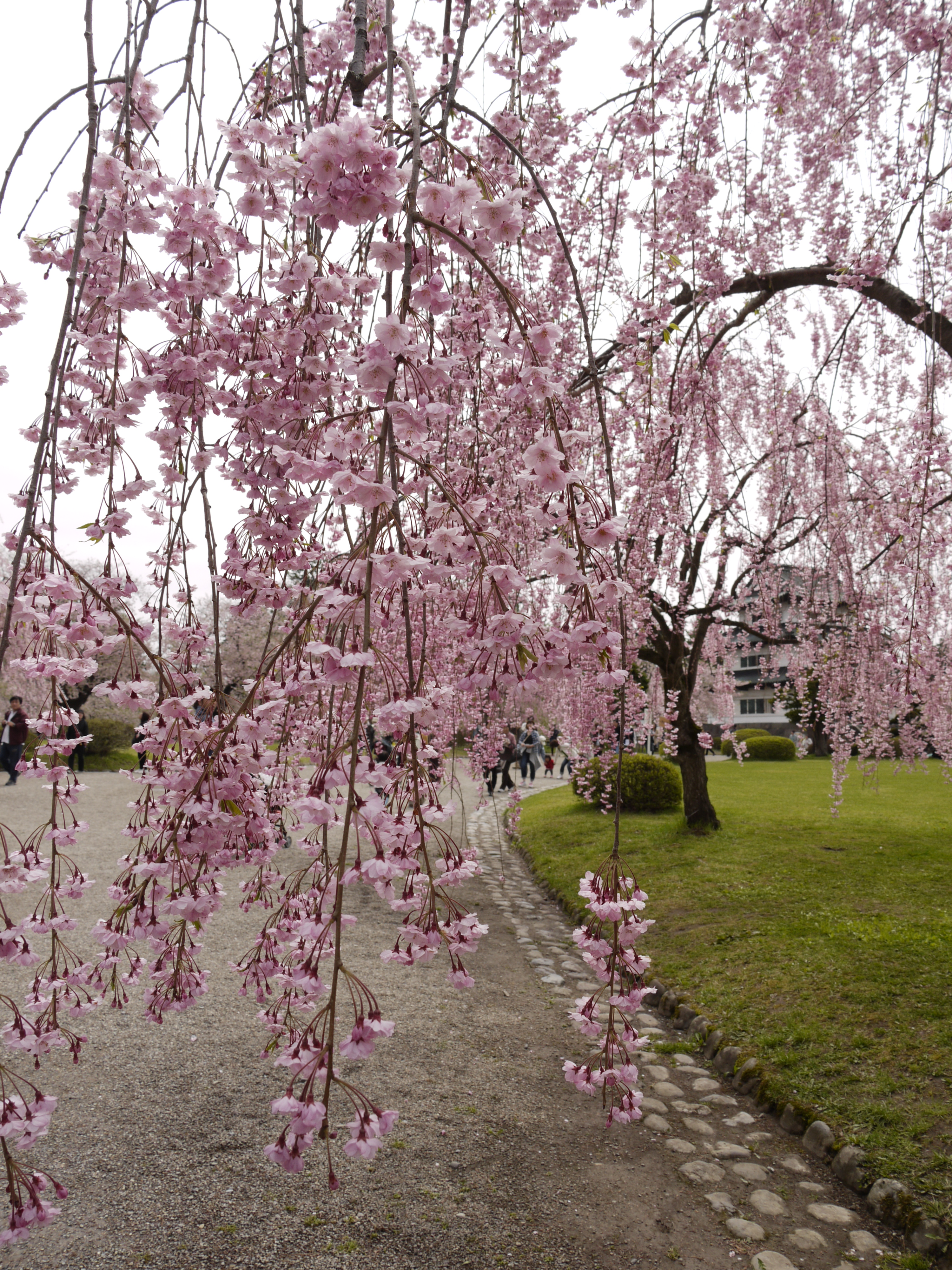 弘前さくらまつり 枝垂れ桜